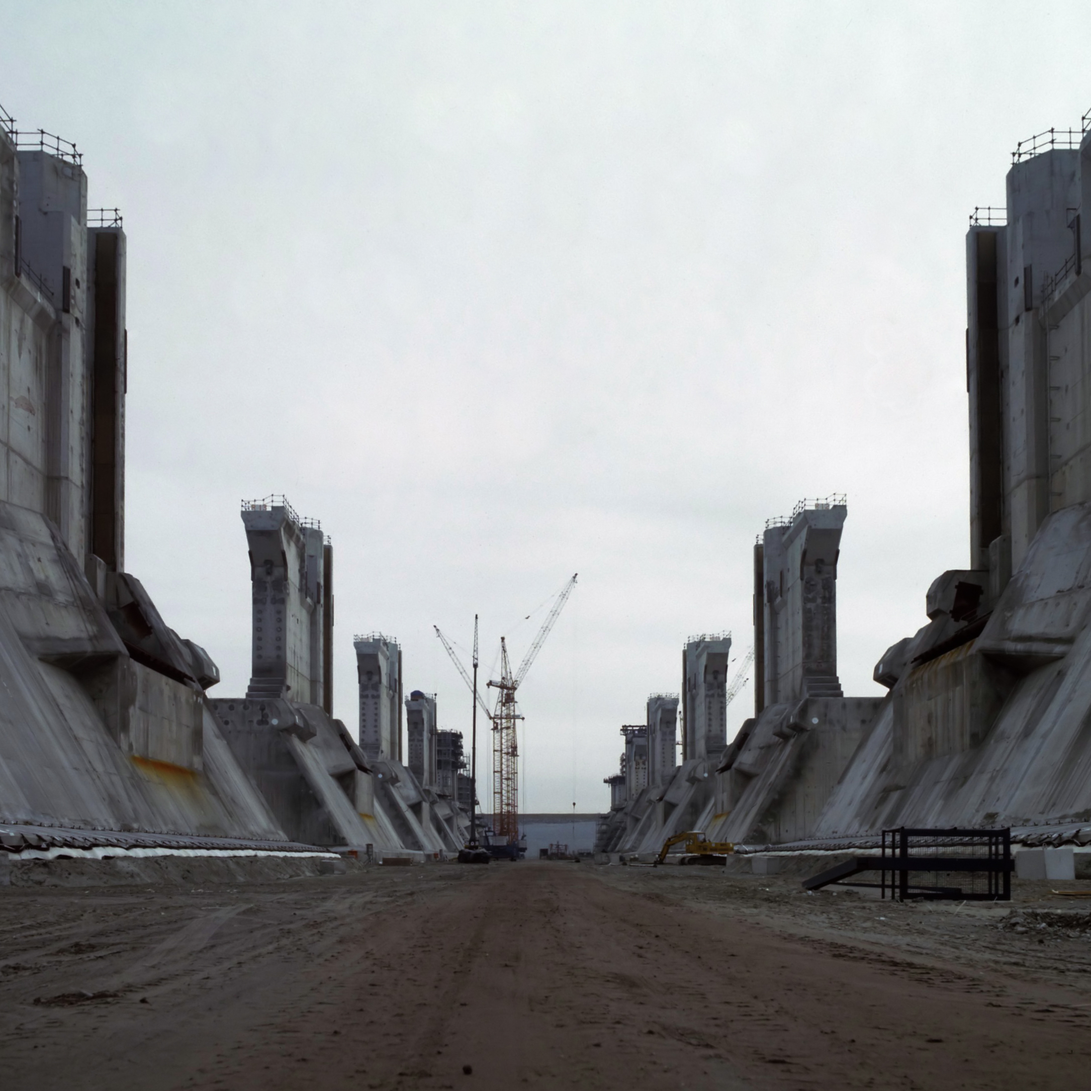 Bouw stormvloedkering Oosterschelde (werkeiland Neeltje Jans); rijtje voltooide pijlers in de bouwput 11 februari 1982